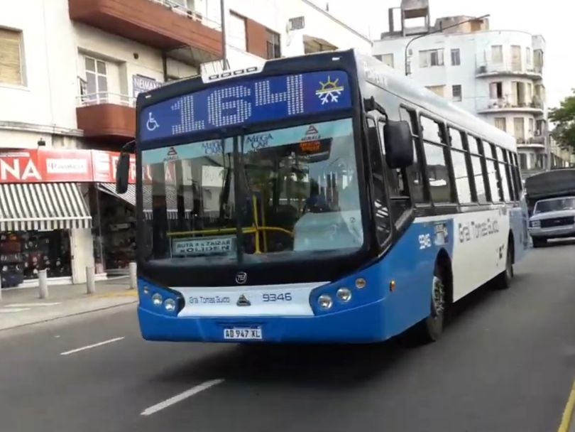 Línea 164